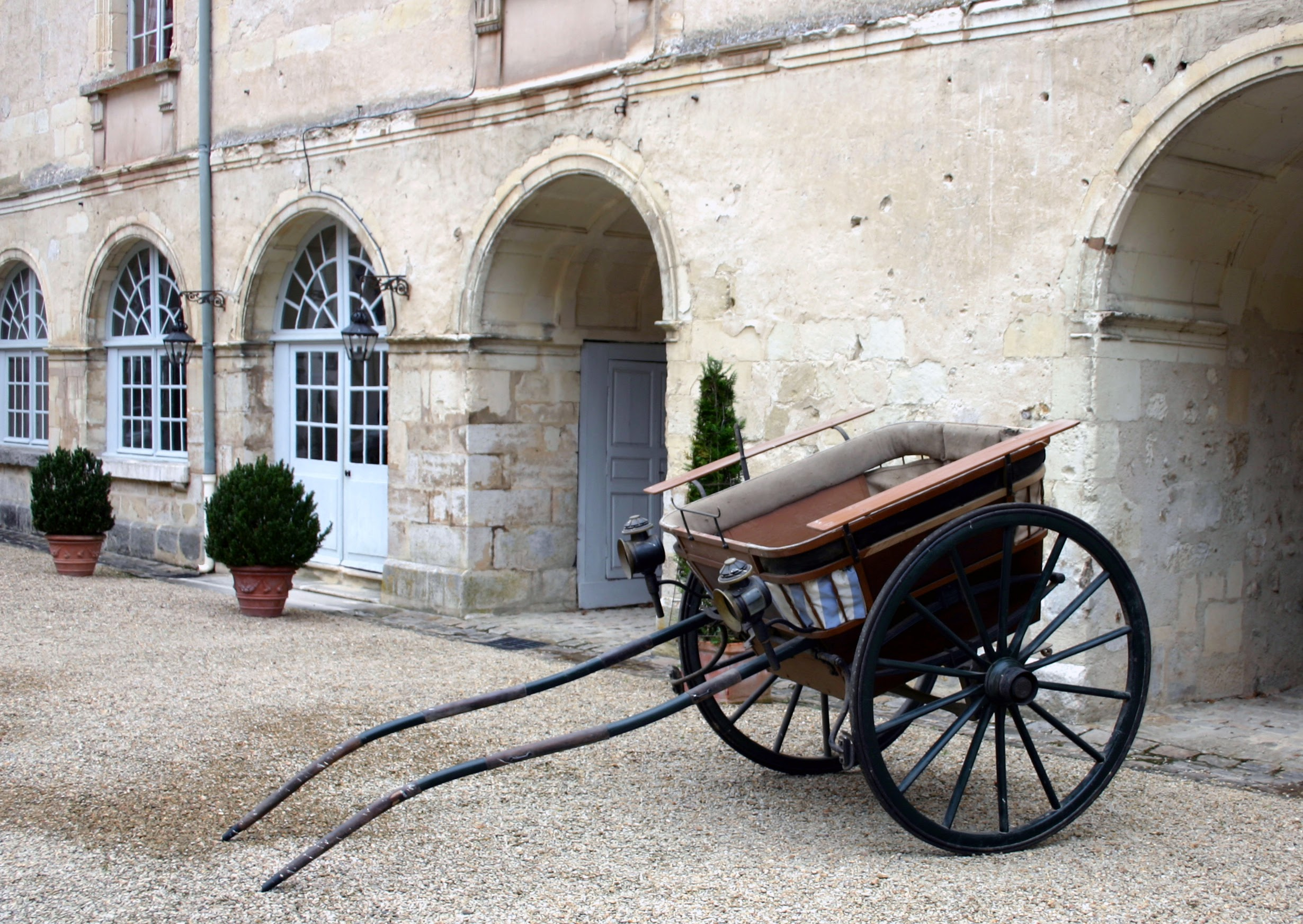 Tonneau d'Alfred Belvalette acheté dans les années 1900 aux Champs-Elysées à Paris photographié en 2007 dans la cour d'honneur du Château de Condé